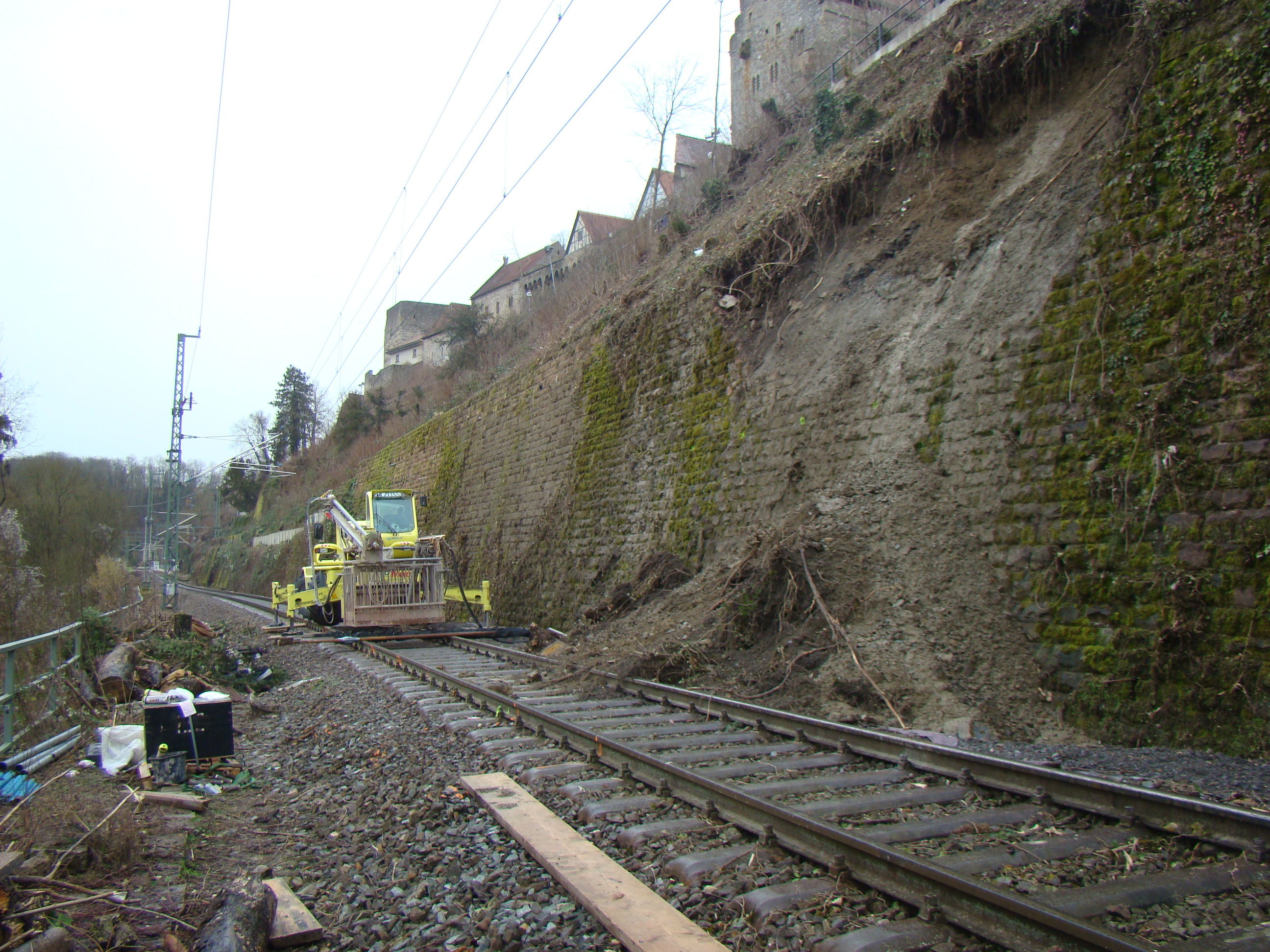 Erdrutsch auf der Bahnstrecke bei Bad Wimpfen, Februar 2013